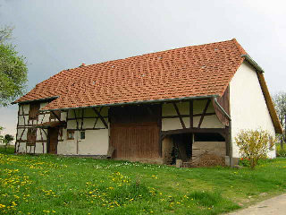 Ferme traditionelle à colombages de Recouvrance (Territoire de Belfort) Photo prise en mai 2004 par LP90